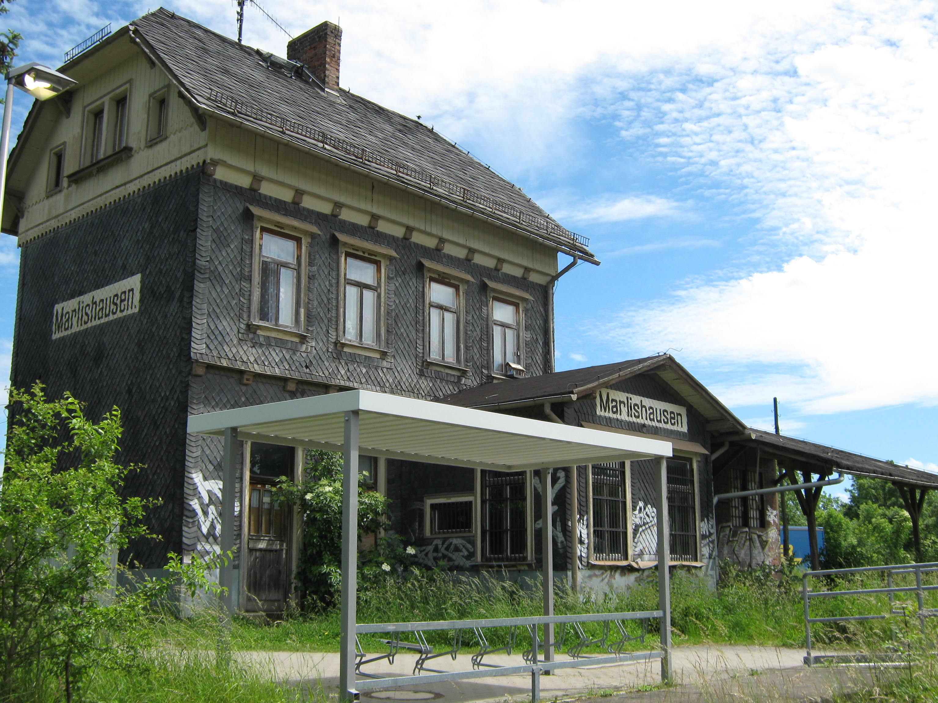 Bahnhof Marlishausen im Ilmkreis (Thüringen)